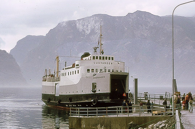 Aurland fergekai. MF Gudvangen i rute Flåm-Aurland-Gudvangen.